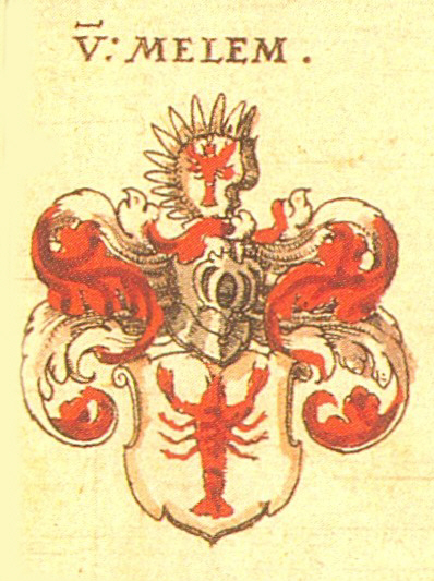 Wappen der Frankfurter Patrizierfamilie Melem